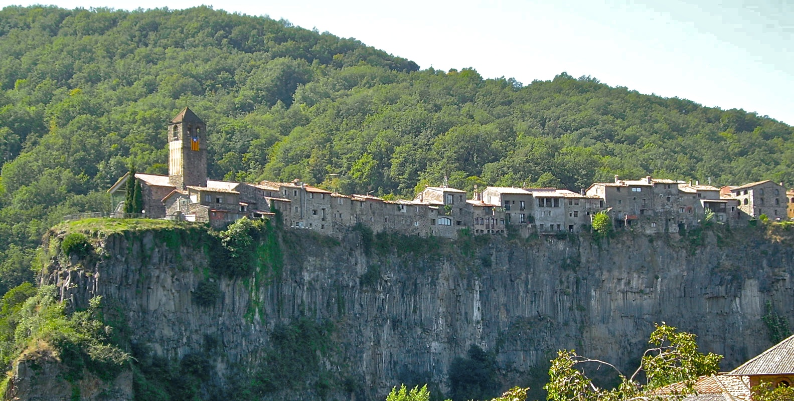 Castellfollit de la Roca sobre la cinglera basàltica